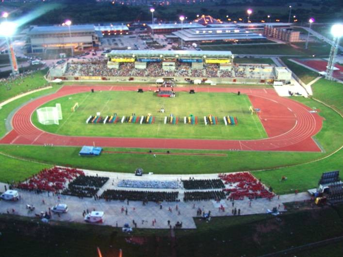 Estadio de Futbol de la Universidad del Sur, Cojedes, Venezuela